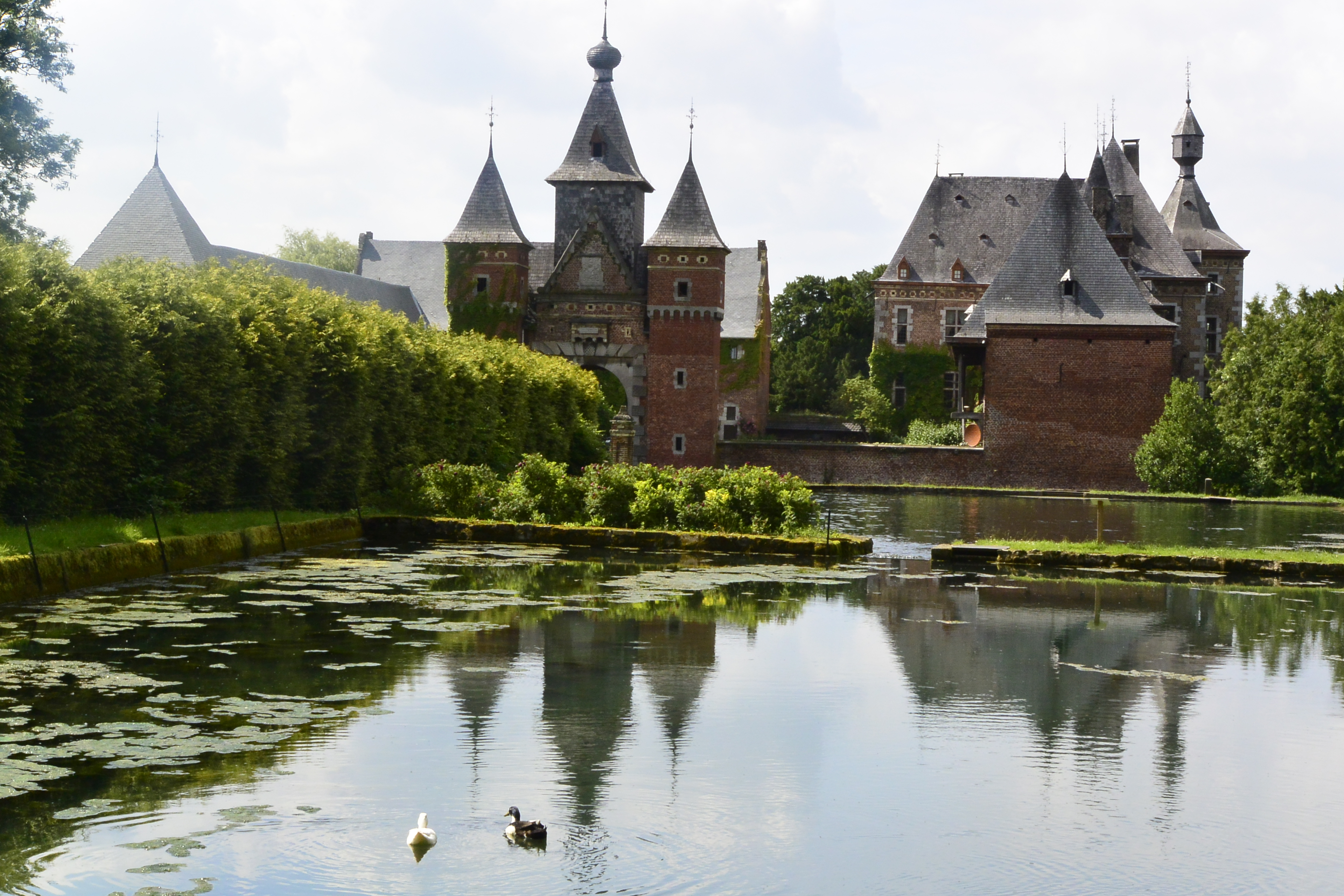 Commanderij -in Sint-Pieters-Voeren 2016